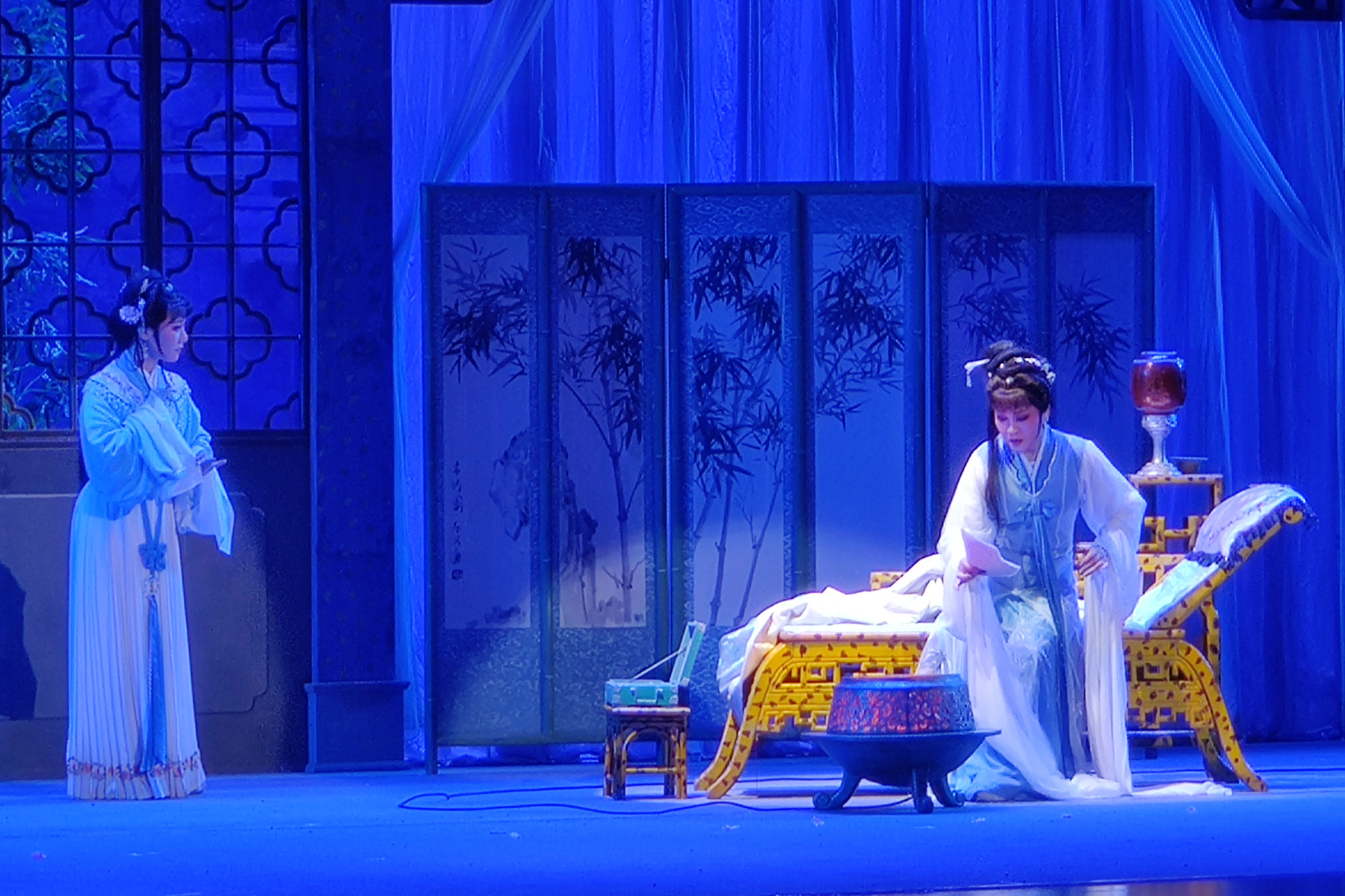 中文（中国大陆）: 红楼梦 焚稿